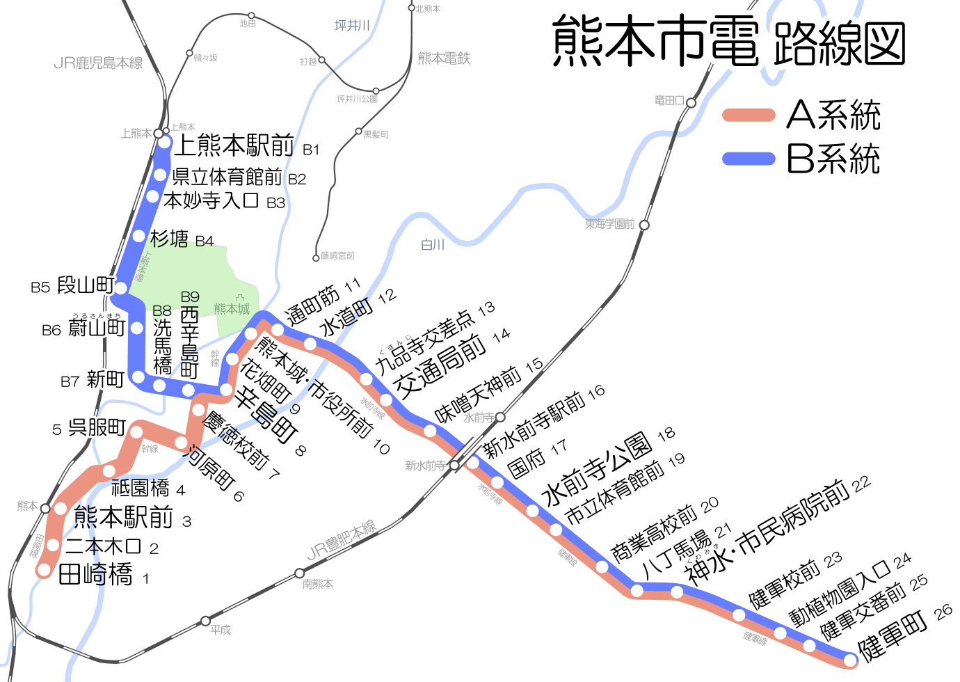 熊本市電の路線図。2011年3月1日に、系統名・電停名などが変更されます。 系統名の変更 2系統 → A系統(ラインカラー:赤) 3系統 → B系統(ラインカラー:青) 6ヶ所の電停名の変更 熊本城前 → 花畑町 市役所前 → 熊本城・市役所前 動植物園前 → 動植物園入口 神水橋 → 神水・市民病院前 水前寺駅通 → 新水前寺駅前 本妙寺前 → 本妙寺入口 電停ナンバリング実施